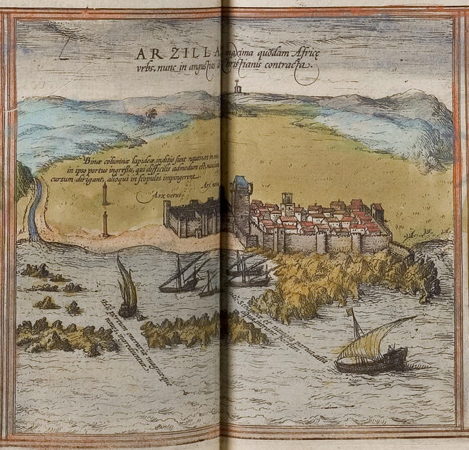 Asilah